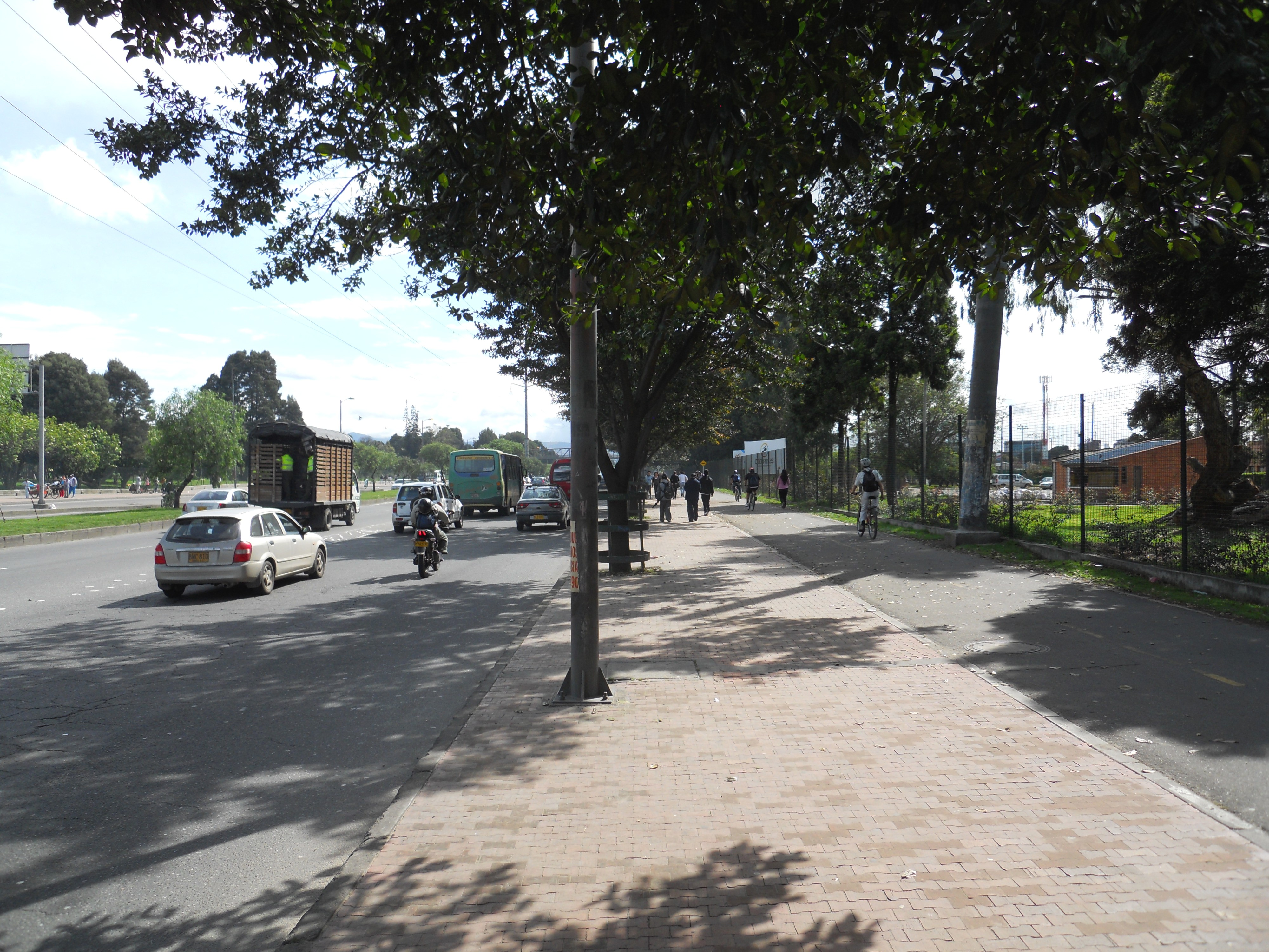 Bogotá. Cicloruta en el costado occidental de la kr 68 o del Congreso Eucarístico, en Engativá.